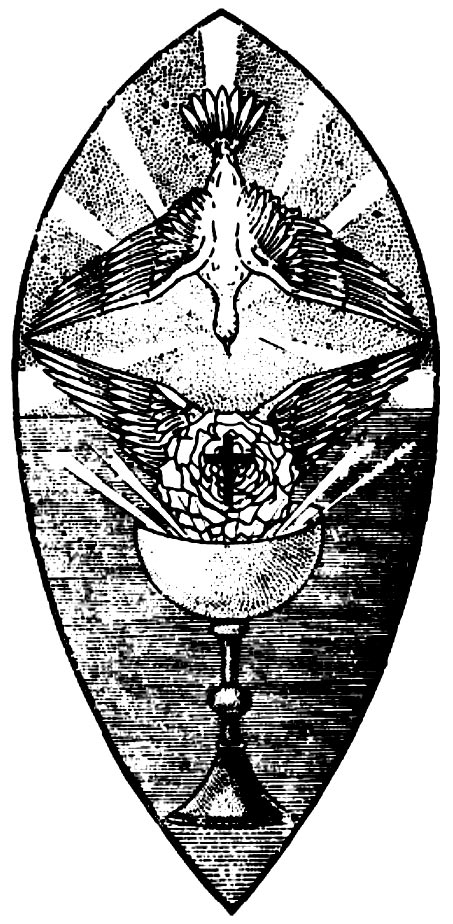 Az Ordo Templi Orientis első lamene